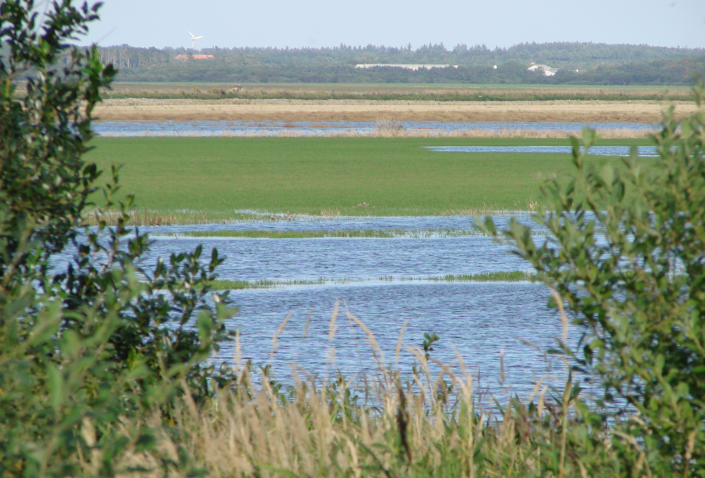 Filsø under gendannelse, set fra sydvest